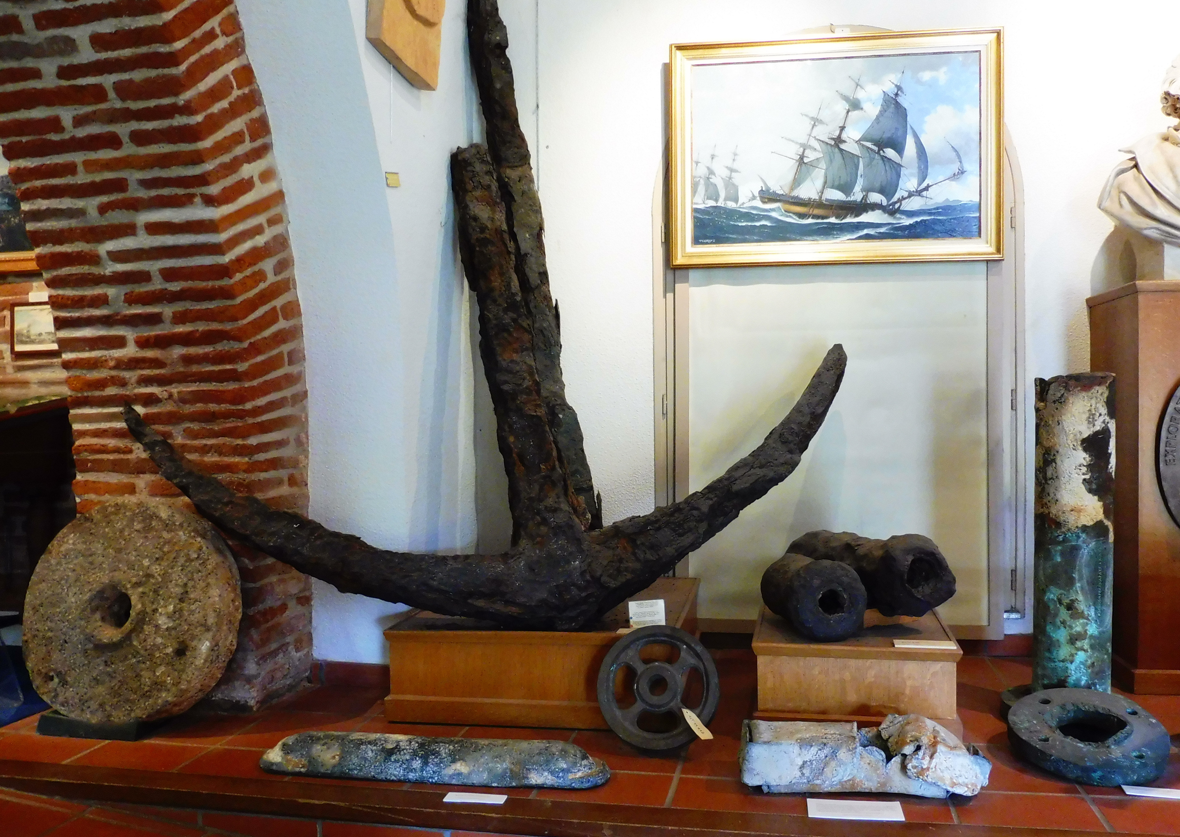 Objets en provenance des recherches archéologiques à Vanikoro, Musée Lapérouse, Albi. Association Salomon.